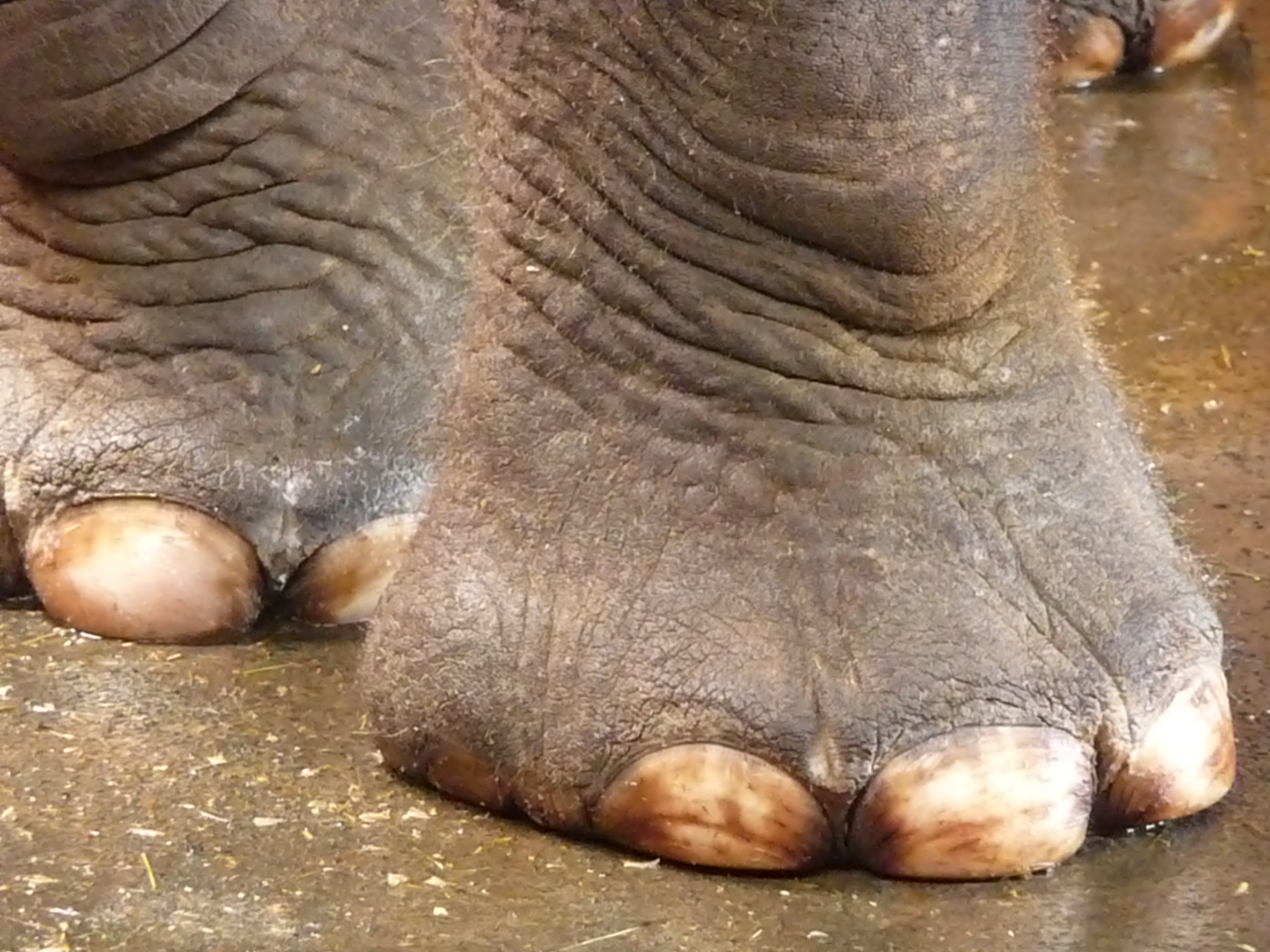 Nahaufnahme von Füßen eines indischen Elefanten